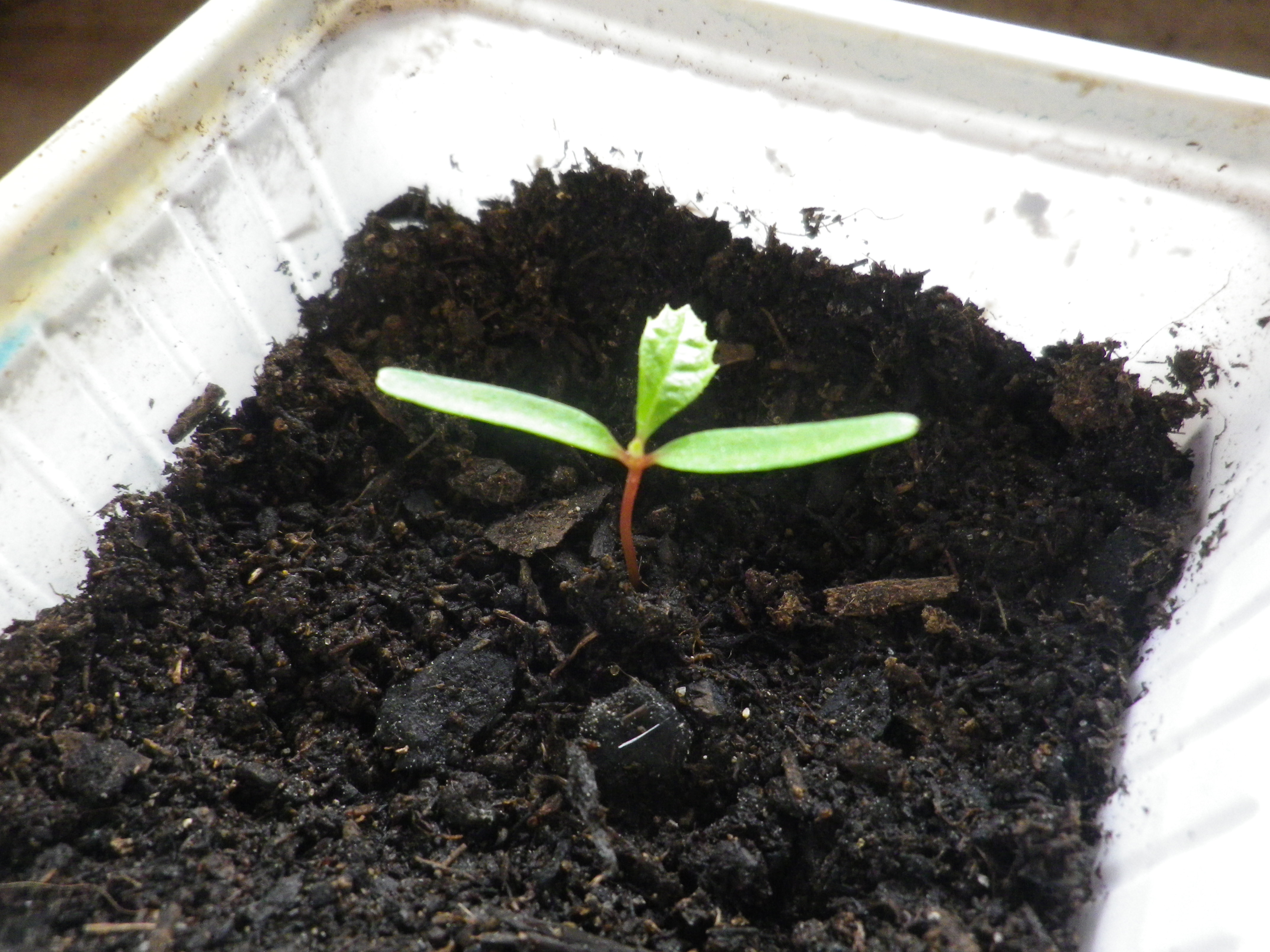 Jeune pousse développent de nouvelles feuilles